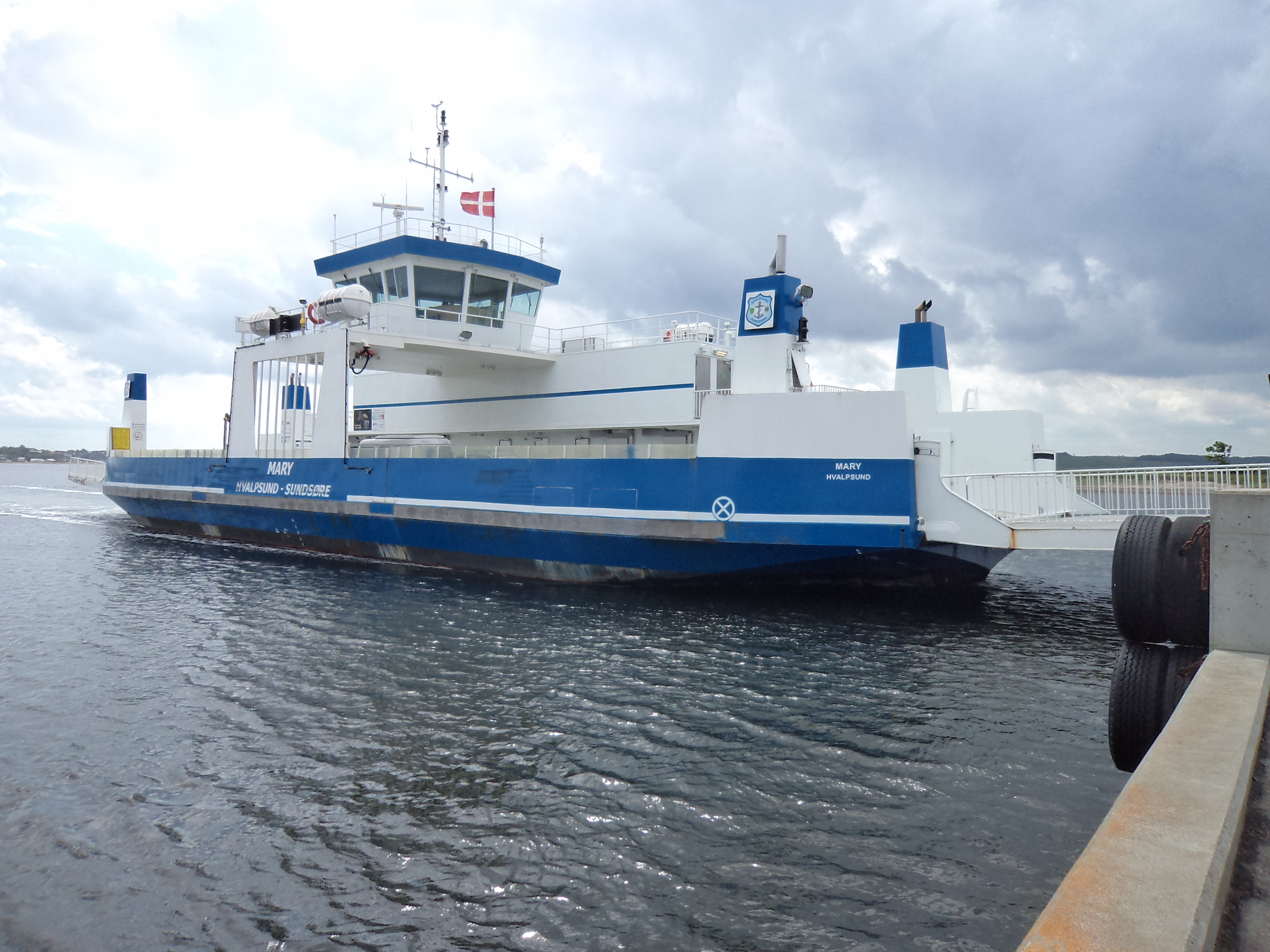 M/F Mary Færge på ruten Hvalpsund - Sundsøre, på vej i havn i Sundsøre.